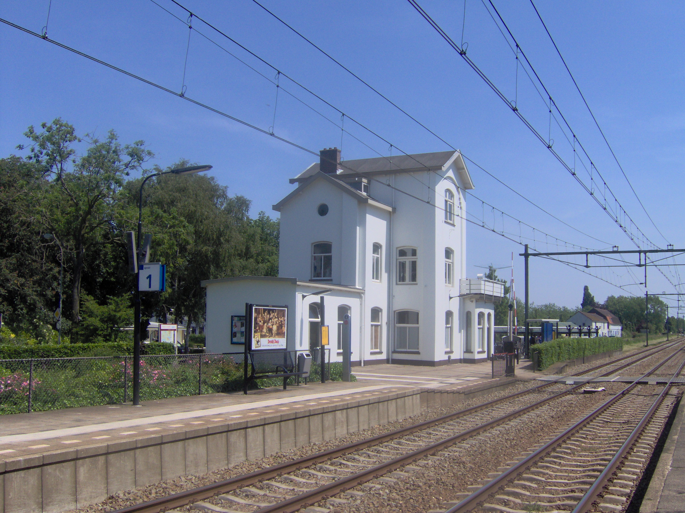 Station Kapelle-Biezelinge